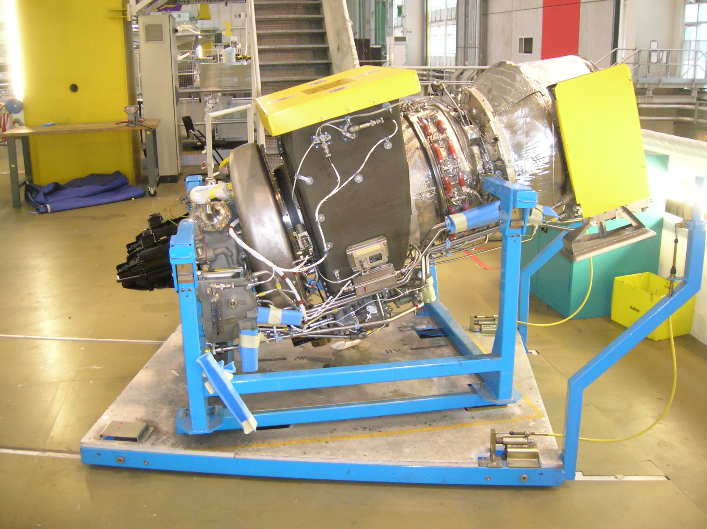 Airbus Lagardère - APU